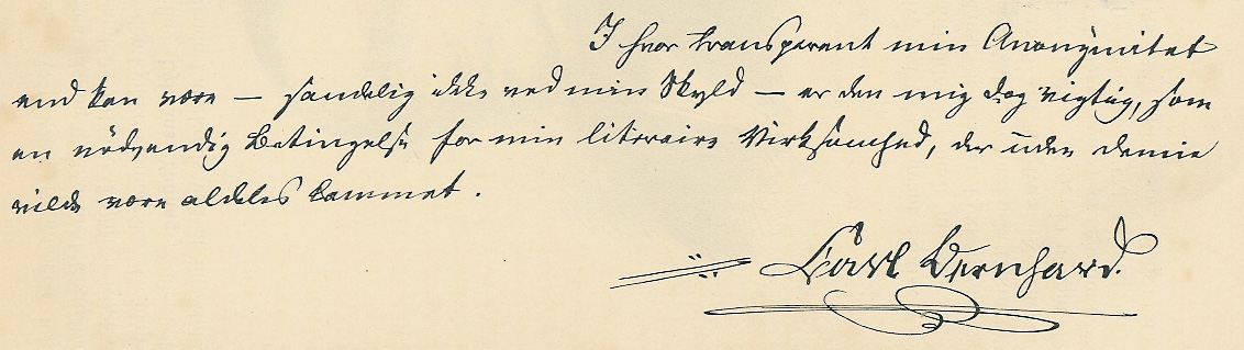 Carl Bernhards (A.N. de Saint-Aubains) håndskrift. Her et brev til gehejmeråd Jonas Collin.